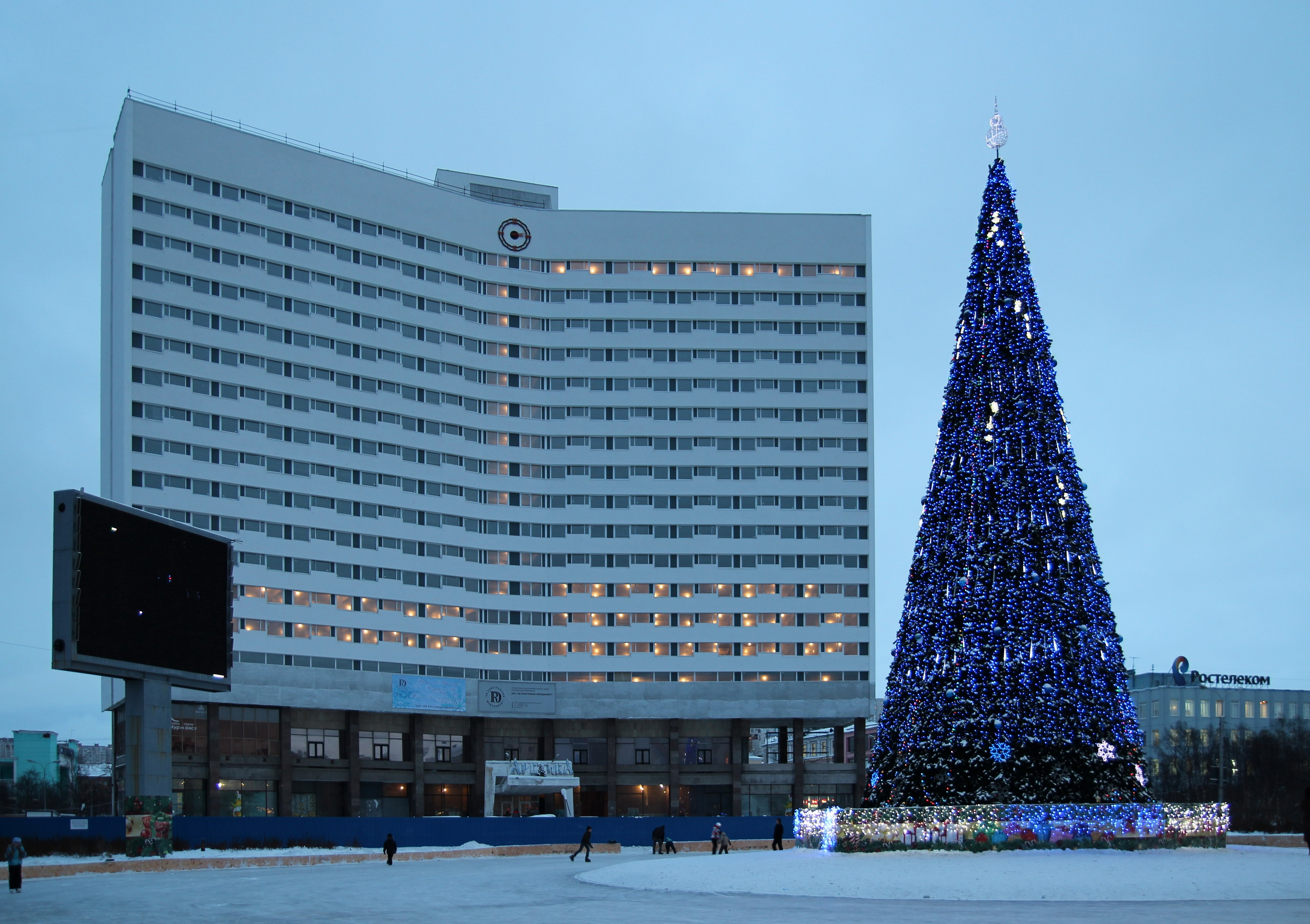 Арктика зимой